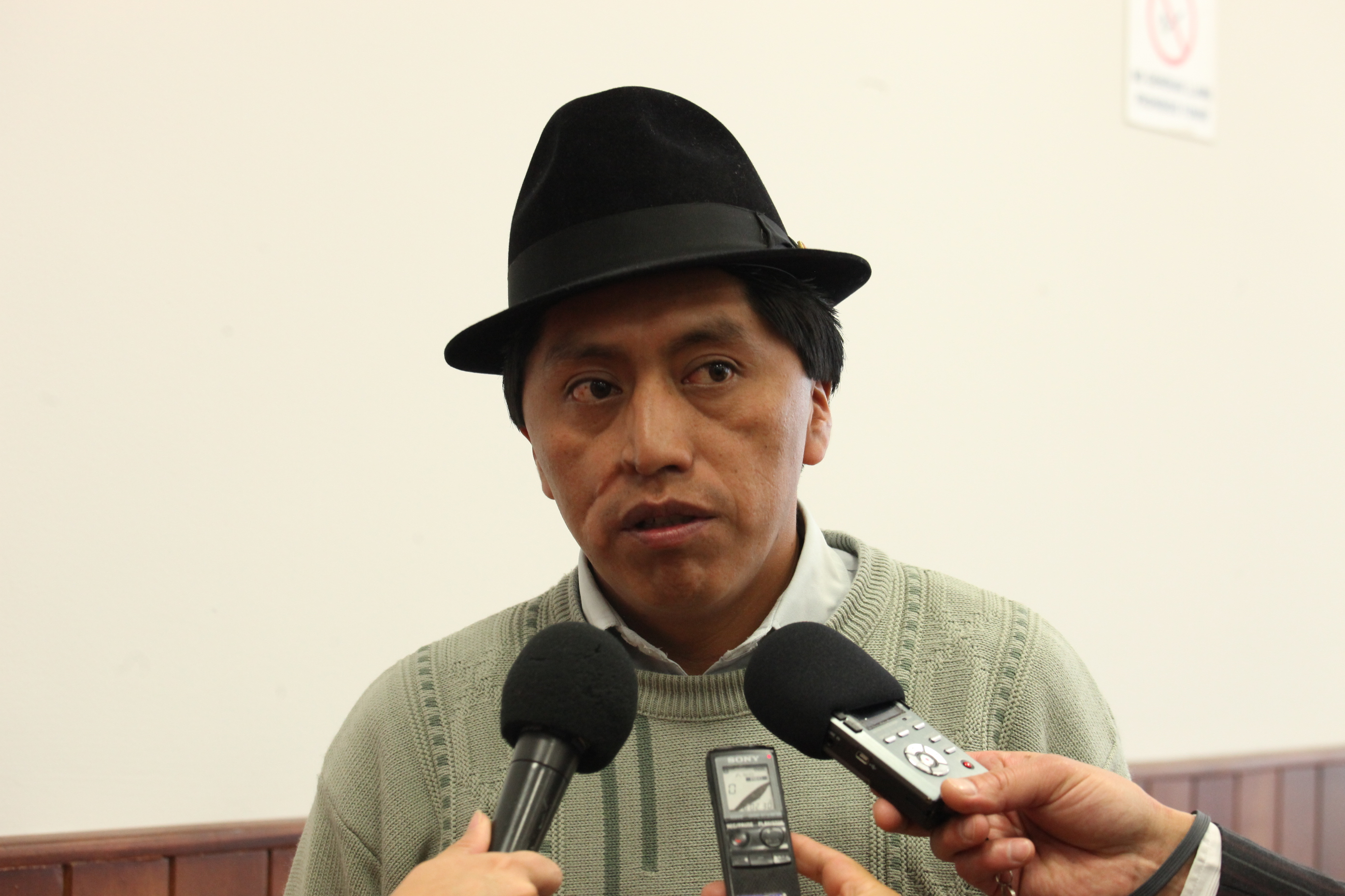 Foto : Marcelo Suárez / Asamblea Nacional.